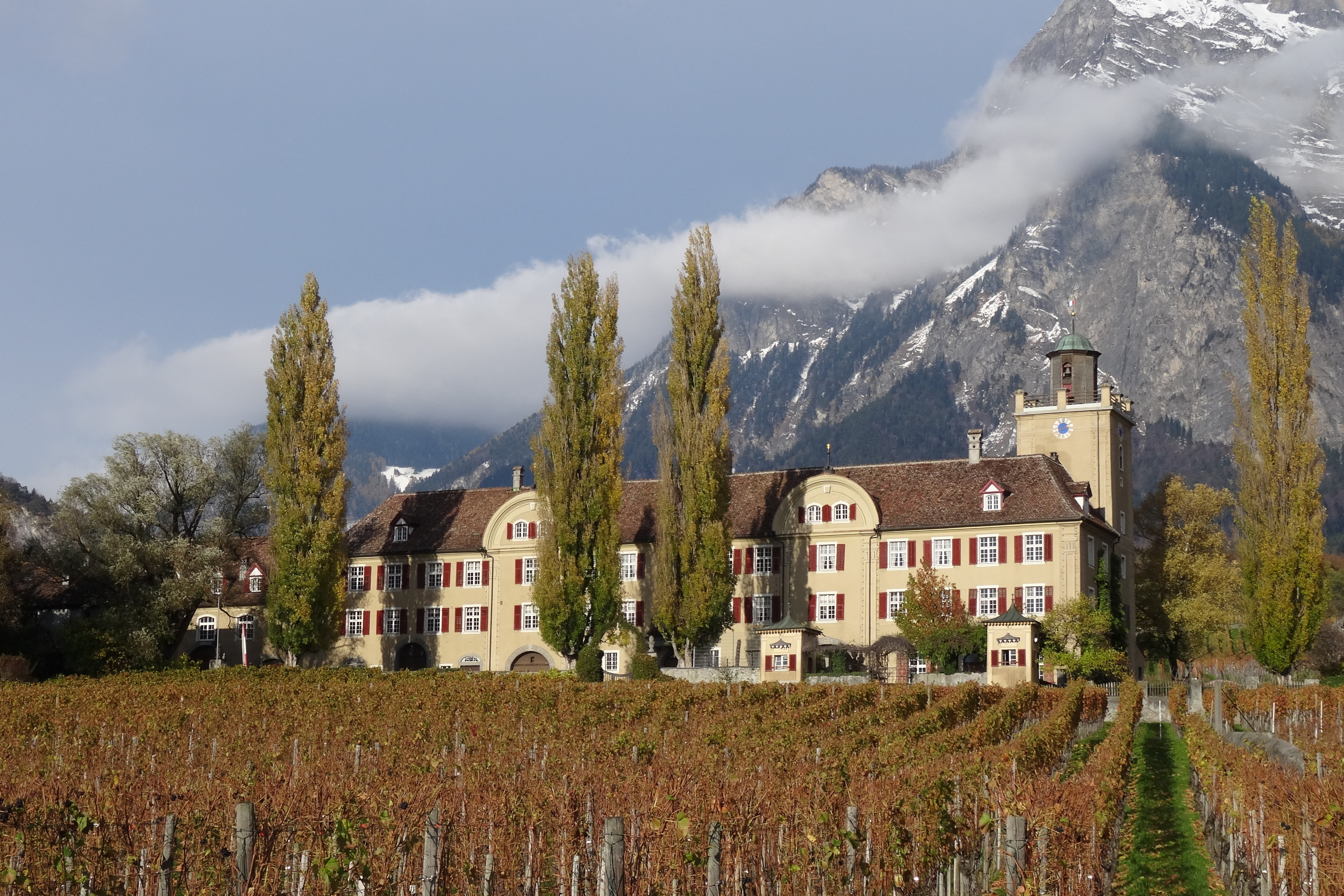 Schloss Salenegg Westseite